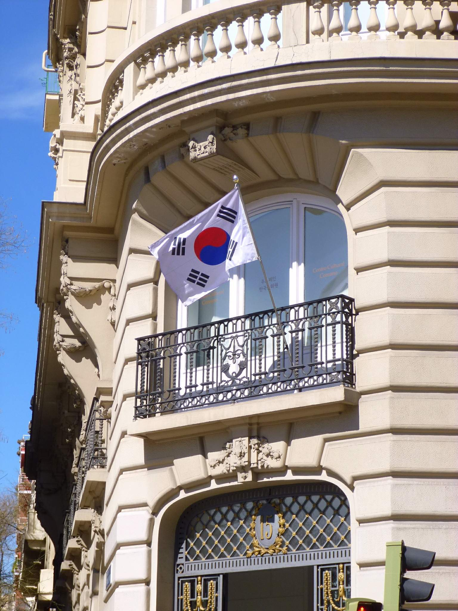 Embajada de Corea del Sur en Madrid.